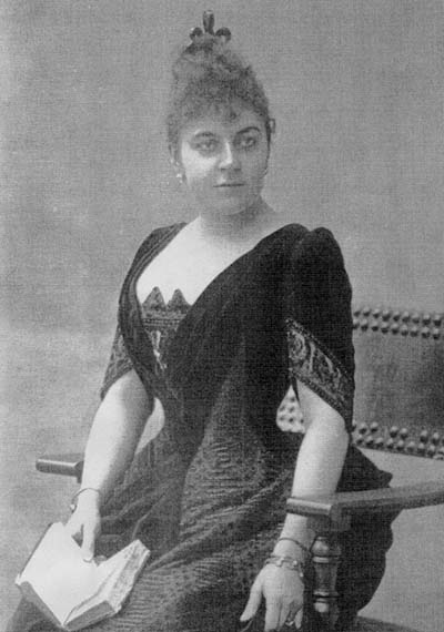 Зинаида Дмитриевна Скобелева (1856-1899),младшая дочь Ольги и Дмитрия Скобелевых. С 1878 года графиня Богарнэ, герцогиня Лейхтенбергская с 1889 года.